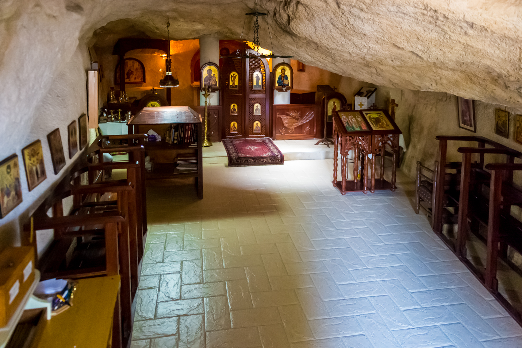 Поземный храм-часовня святителя Николая Чудотворца в Вифании